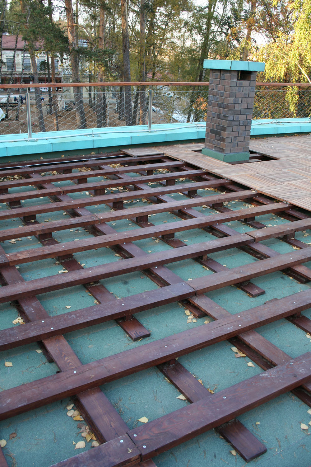 укладка террасы на крыше